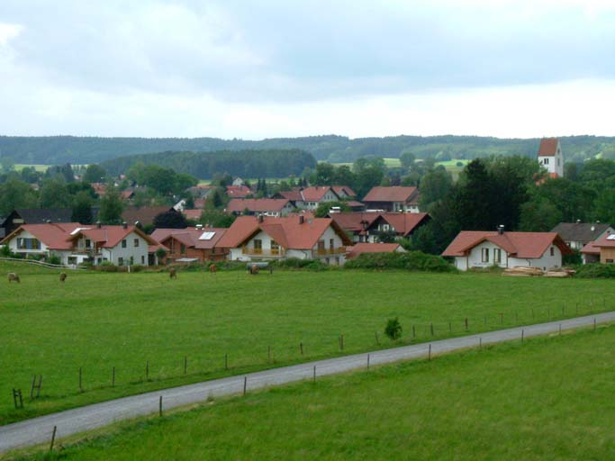 Photo personnelle - juillet 2003